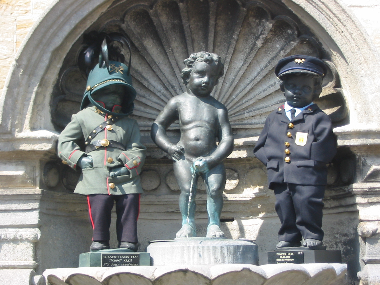 Manneke Pis van Geraardsbergen